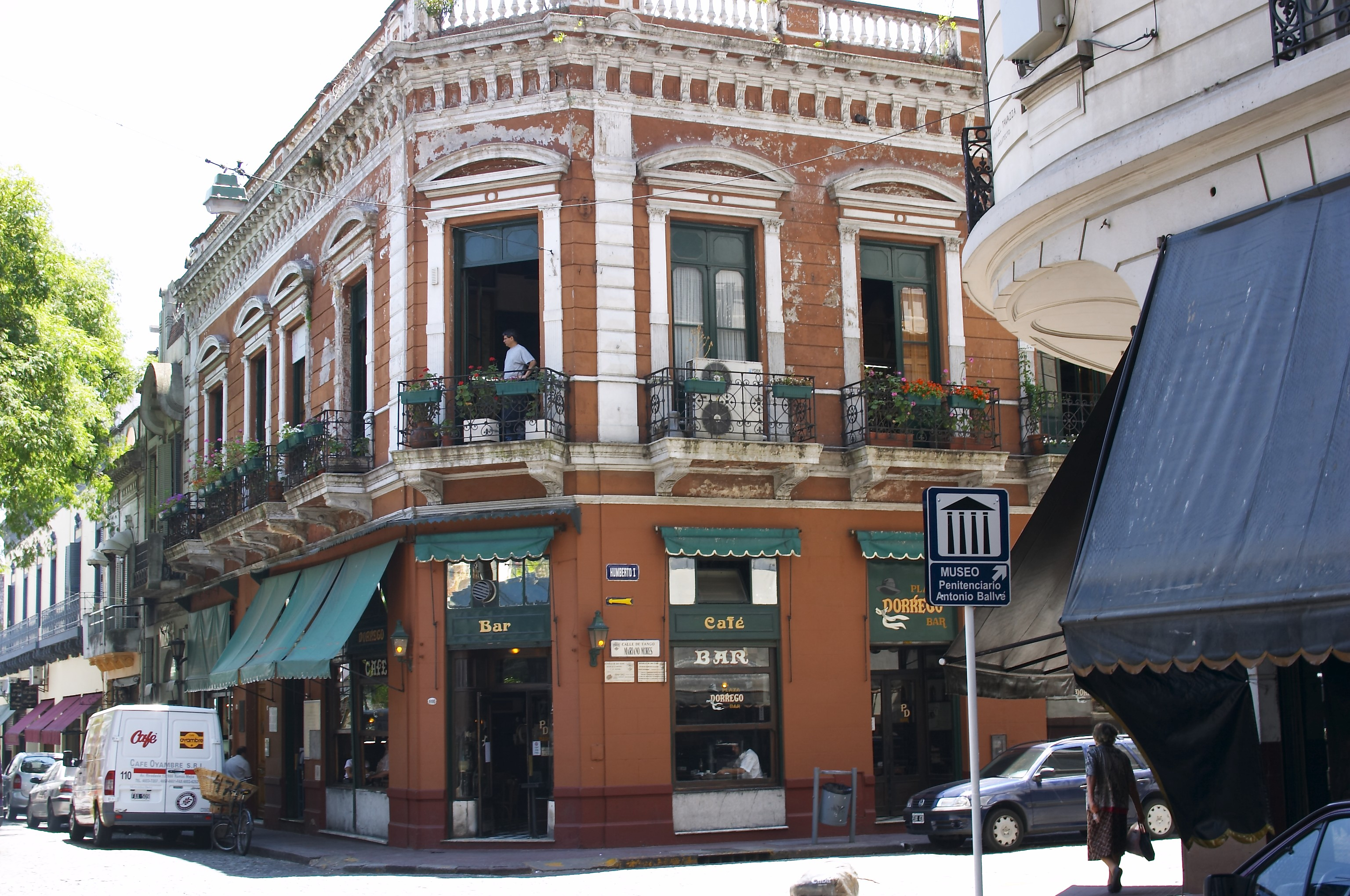 Plaza Dorrego Bar, ubicado en una de las esquinas de Plaza Dorrego, Buenos Aires, Argentina. Barrio de San Telmo.